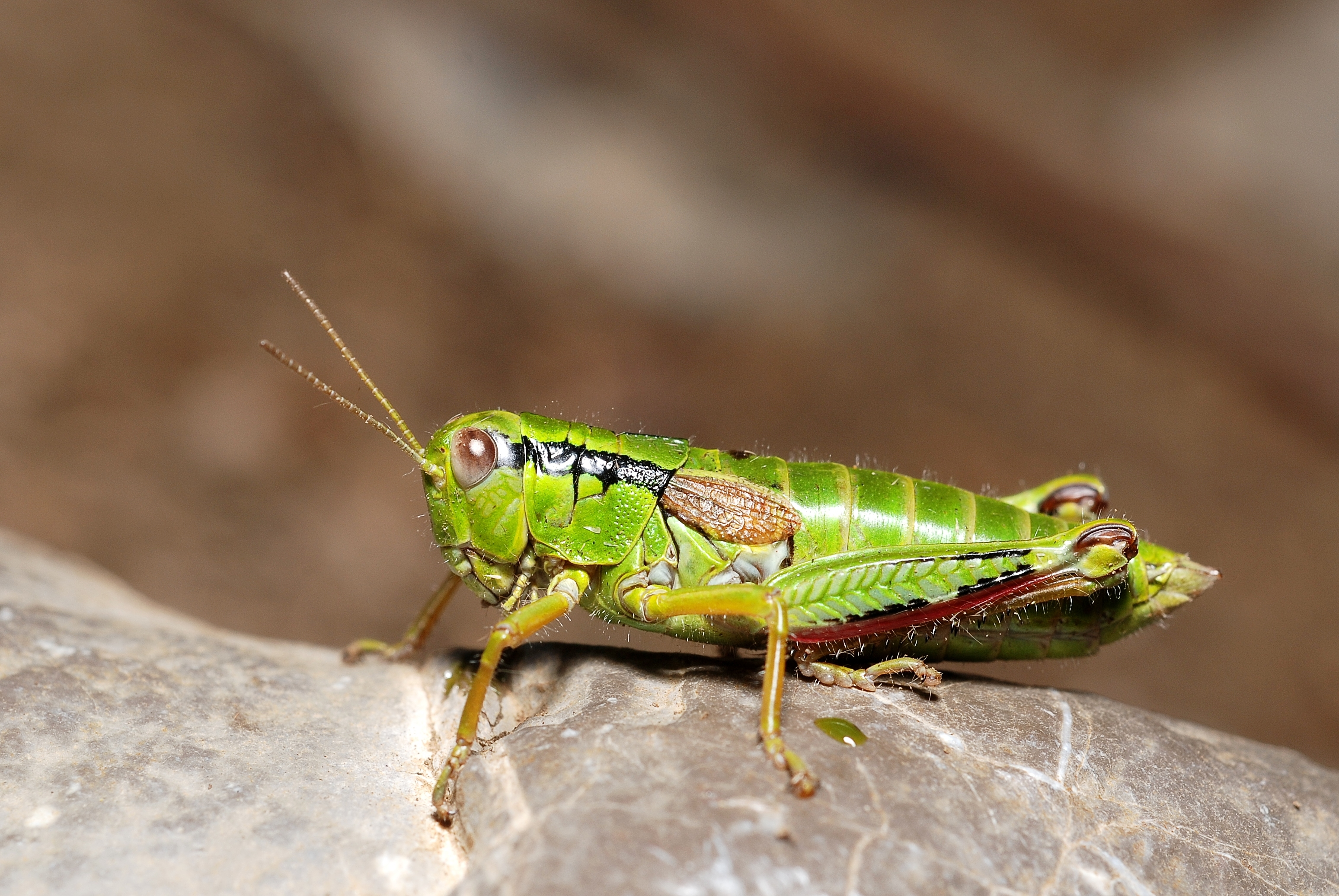 Miramella alpina female